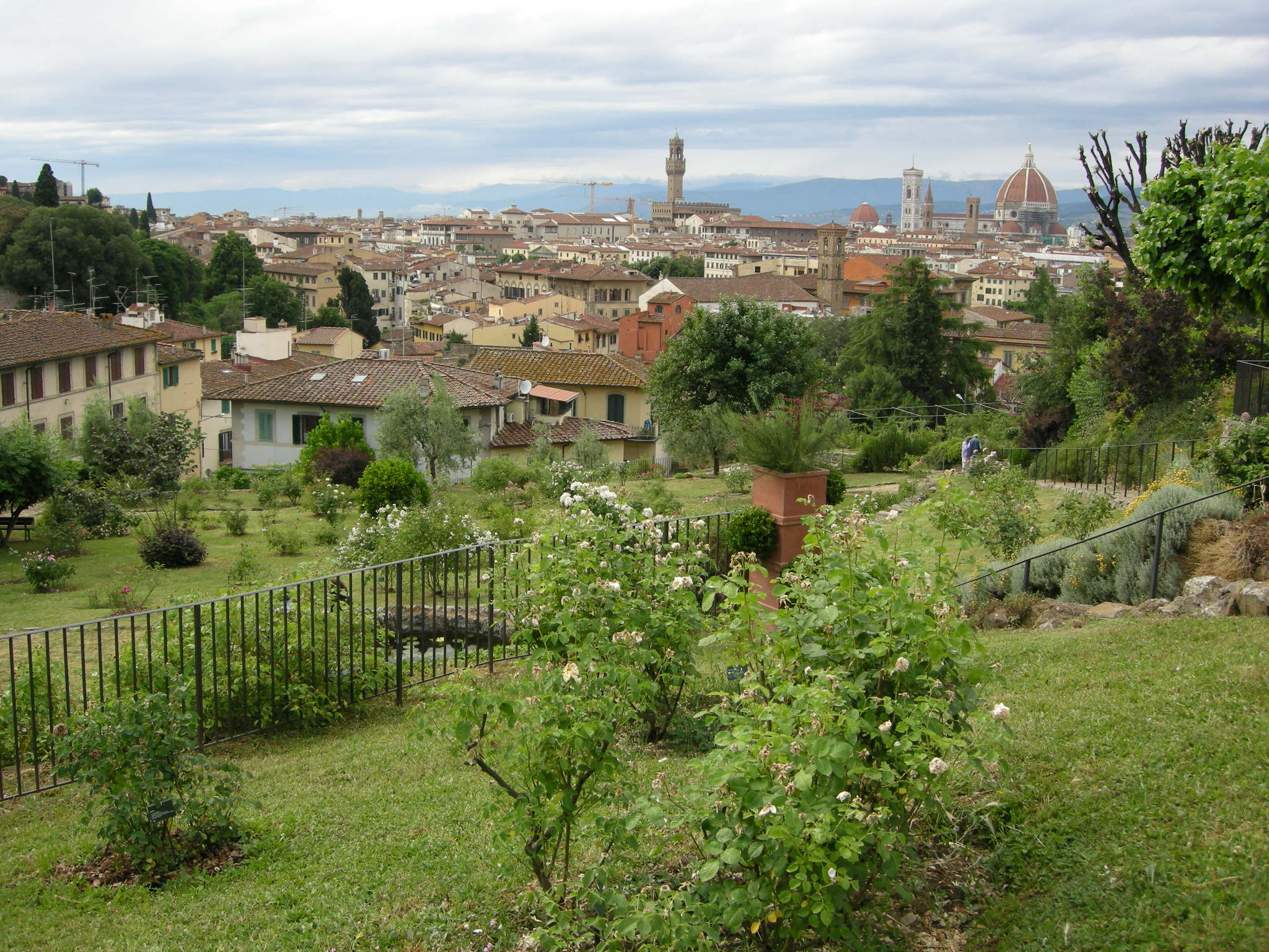 Giardino delle rose di firenze